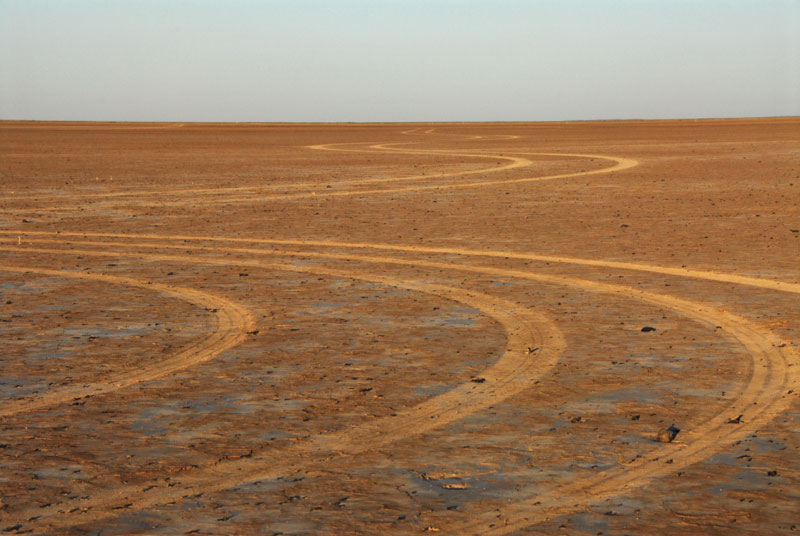 Tracks on Verneukpan.